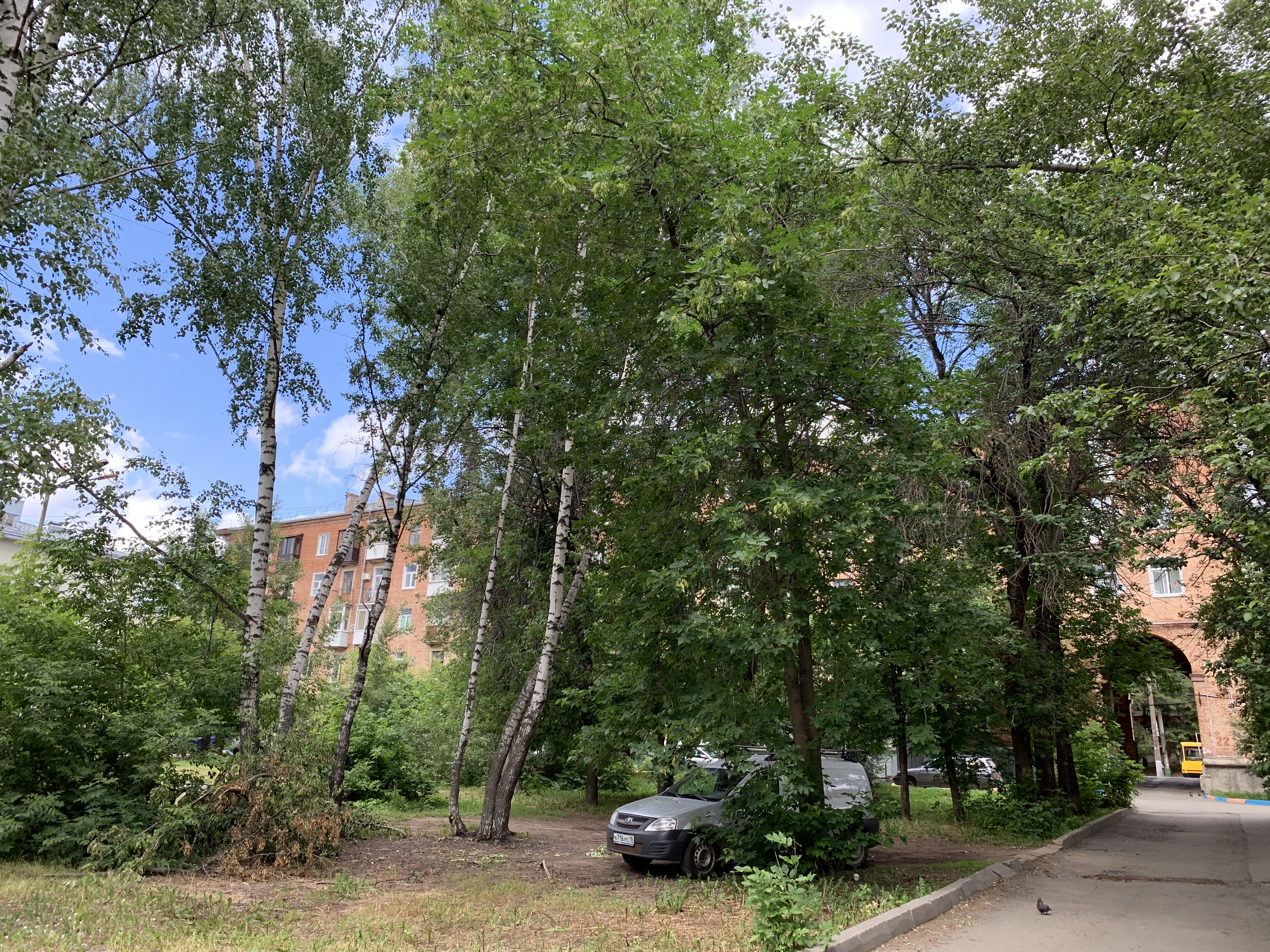 Двор дома (ул. Советская, д. 20), где жил и работал народный писатель Семён Самсонов с 1956 по 1978 г.г.